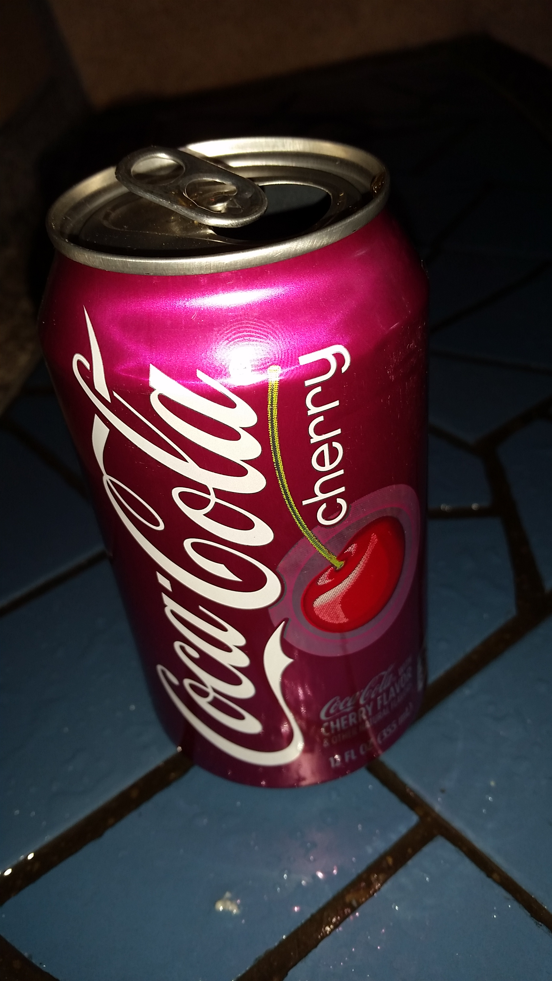 פחית קוקה קולה בטעם דובדבן